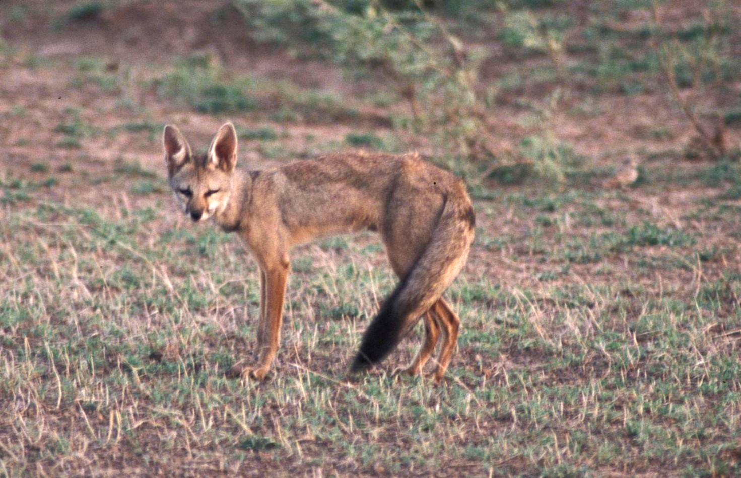 Indian fox, Vulpes bengalensis